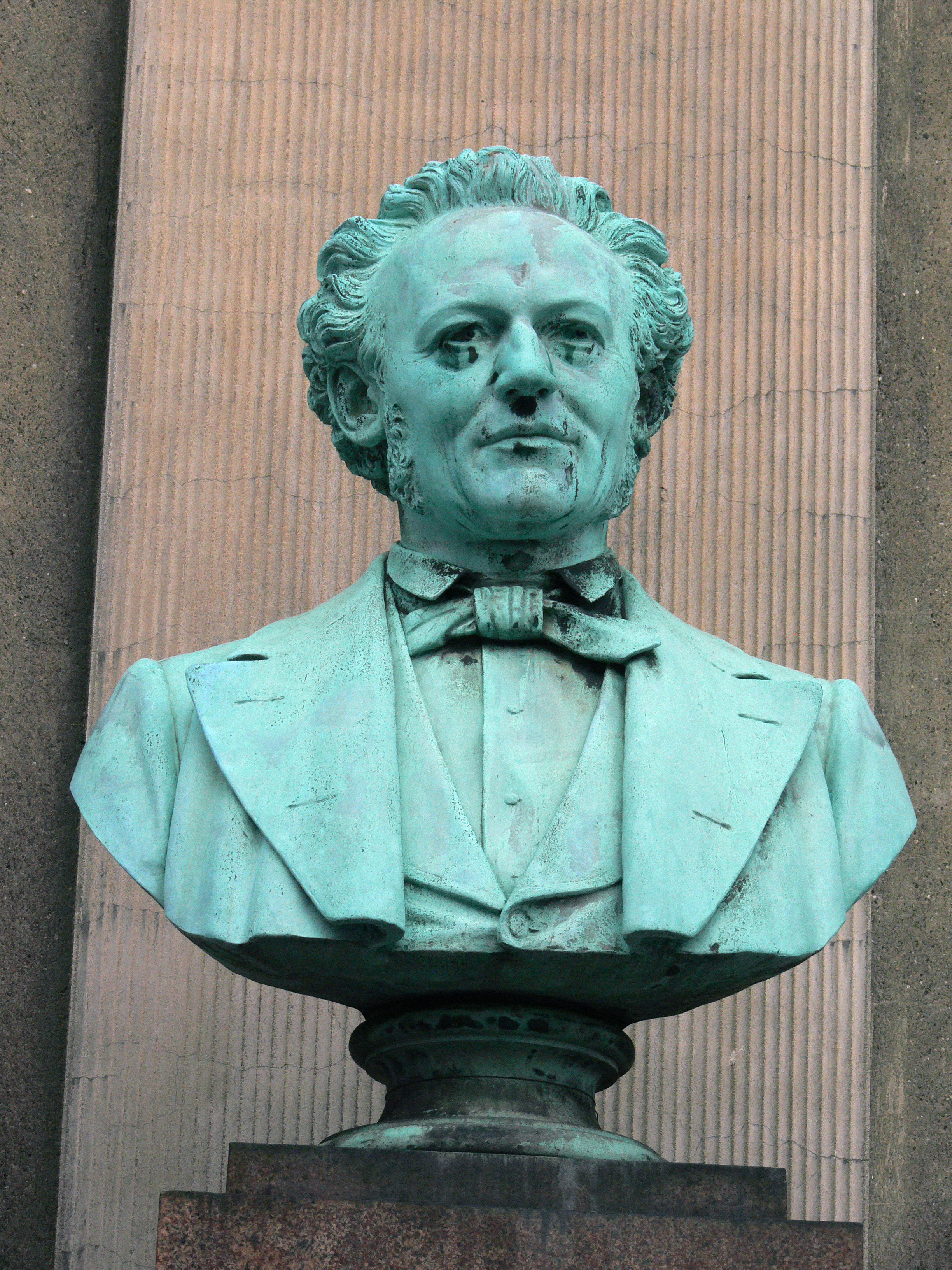 Der dänische Naturforscher Japetus Steenstrup (8.3.1813–20.6.1897). Büste in Kopenhagen.